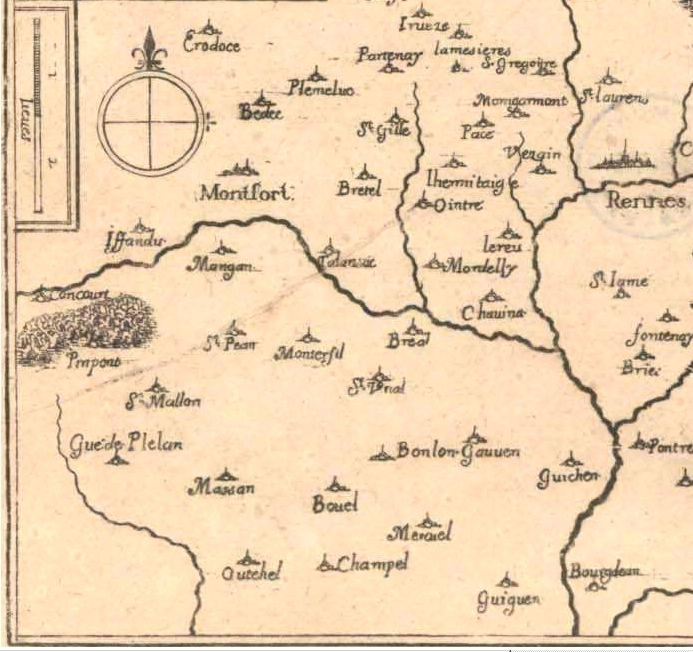 Partie gauche d'une carte anonyme datée de 1638 sur la région de Rennes (France) ; aurait été dressée d'après les données d'un certain Tassin.